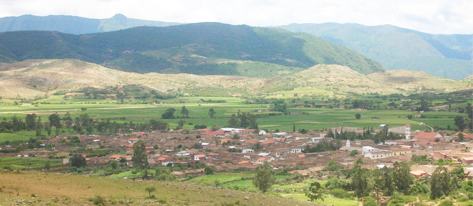 Foto de la ciudad de Padilla